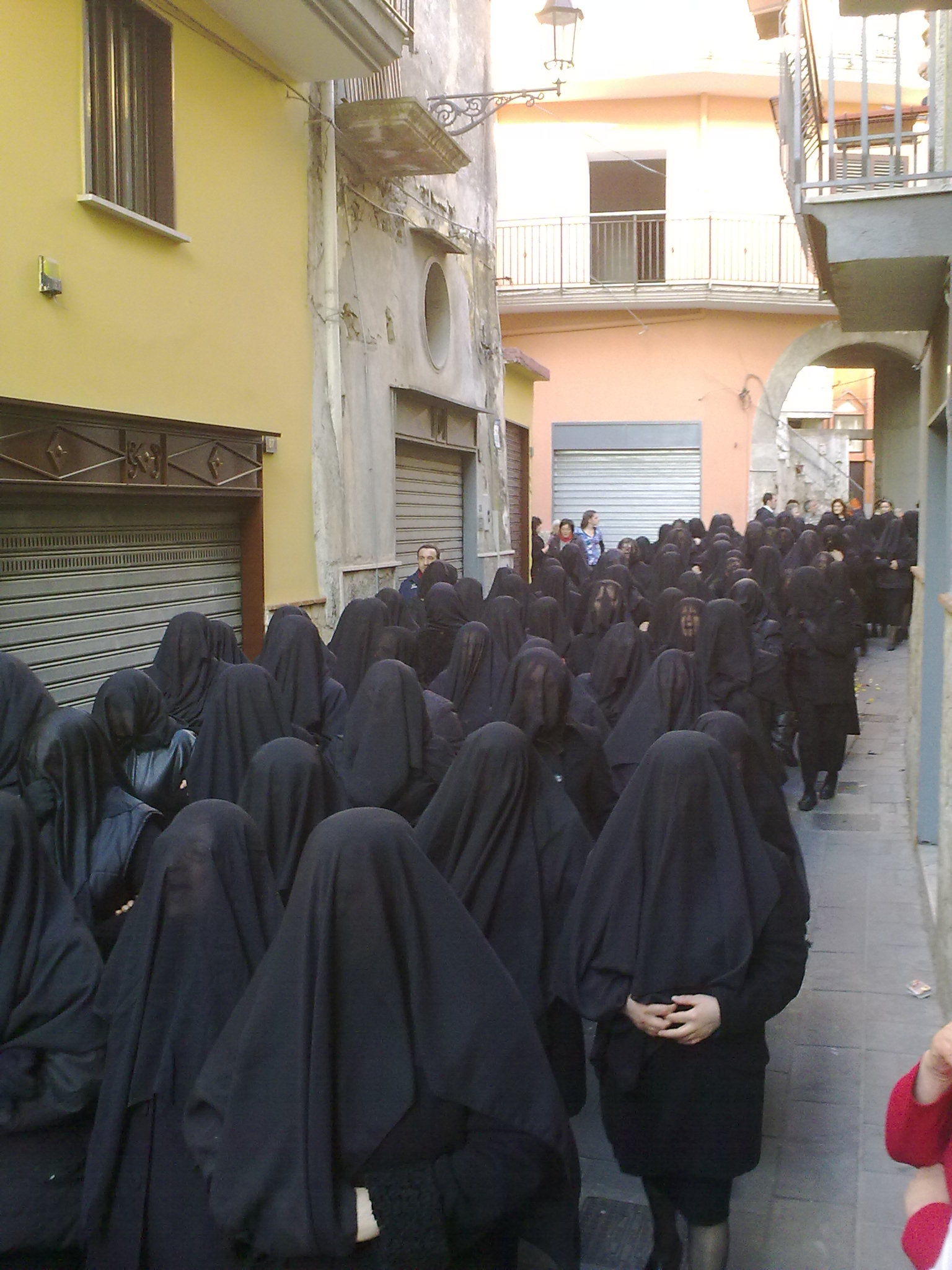 Nocera Inferiore, processione del venerdì Santo. Le "vedove" seguono Gesù morto intonando canti di lutto.